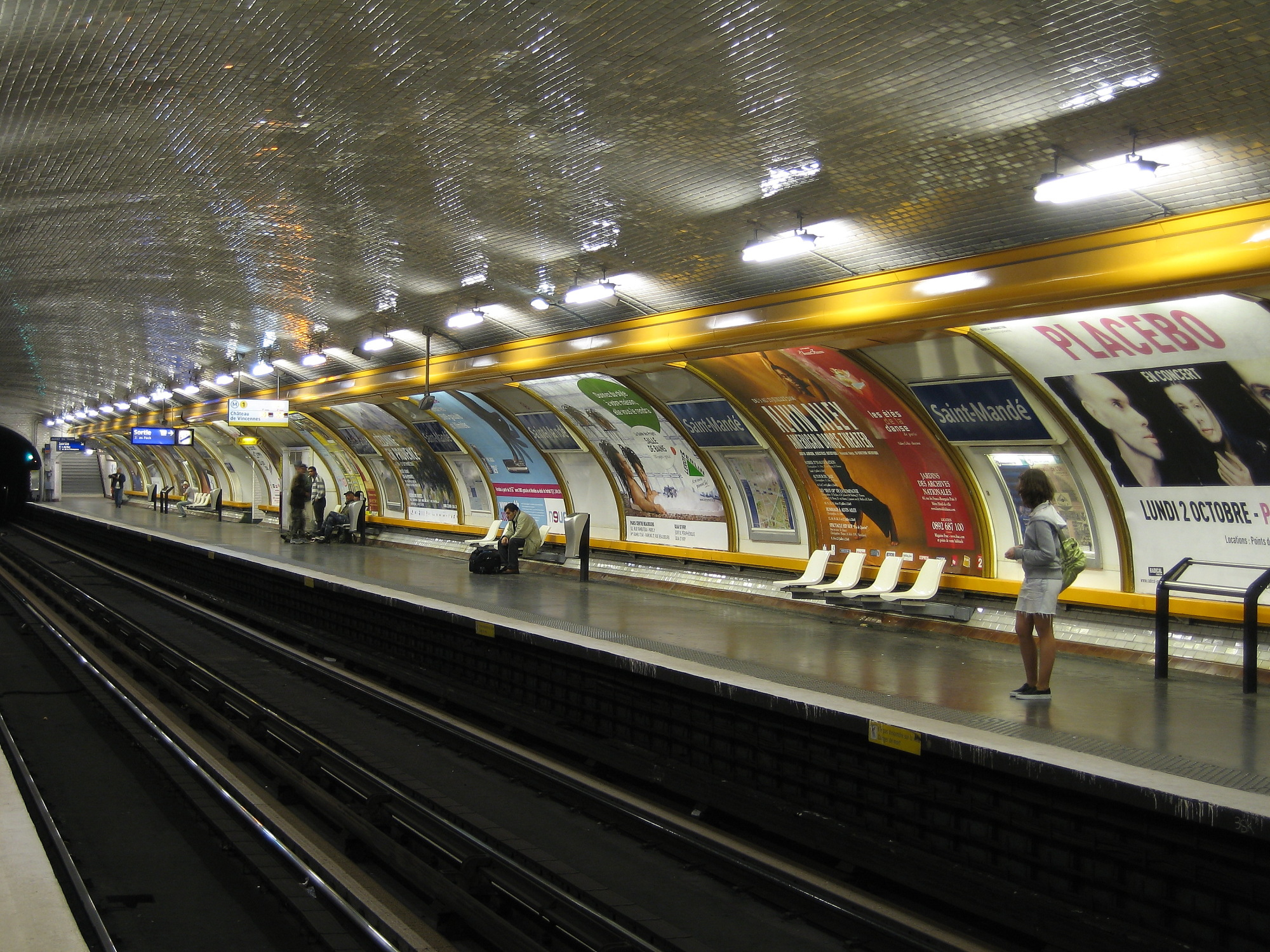 Quai direction Château de Vincennes de la station de métro parisien Saint-Mandé, avant son décarrosage.